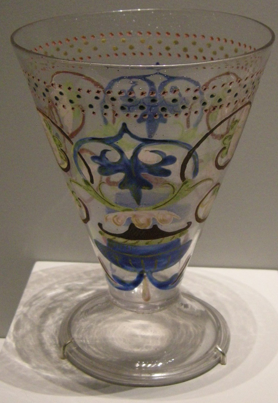 Vetro veneziano, bicchiere, fine 1400-inizio 1500 ca.